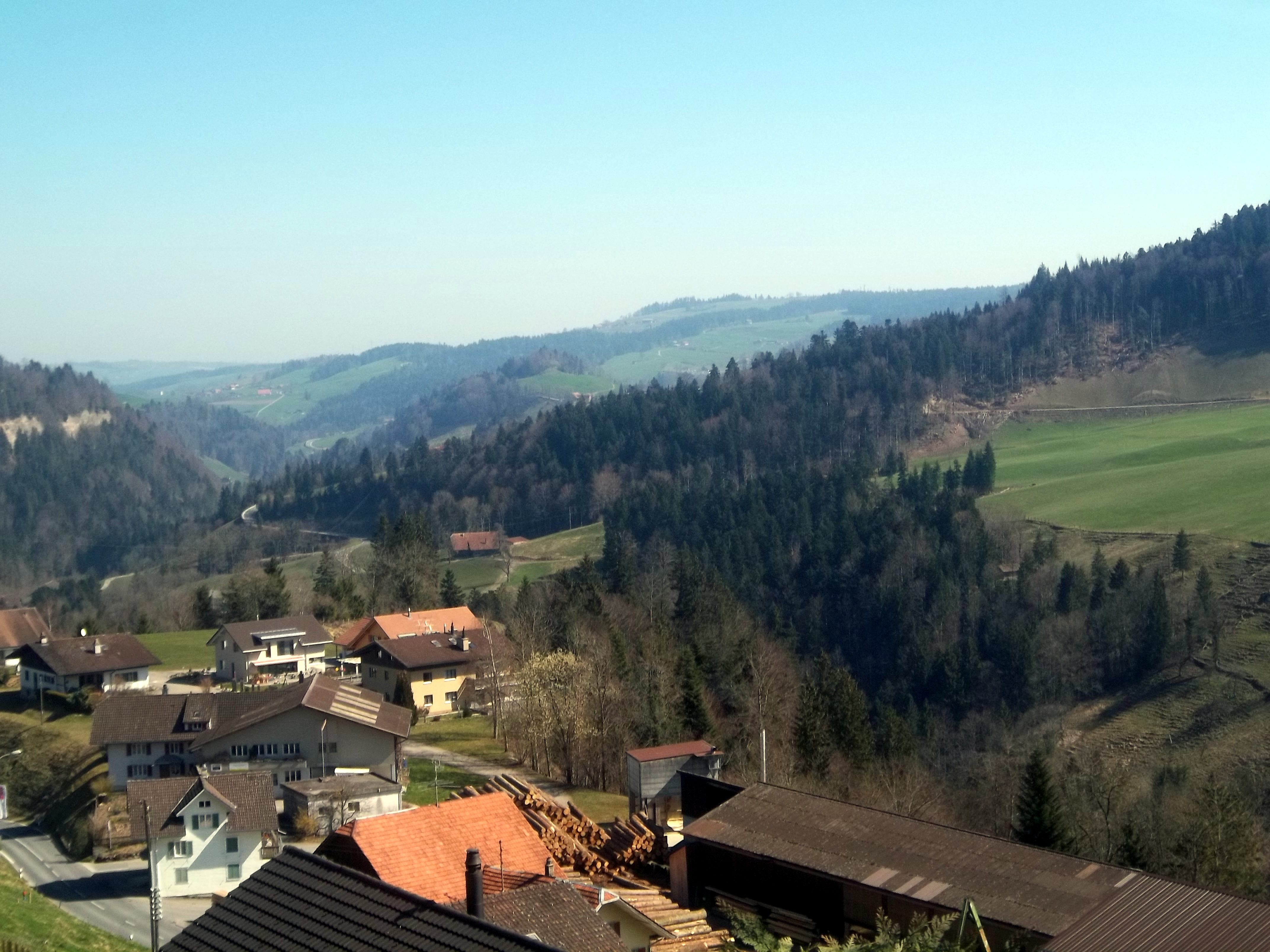 Vista de los alrededores de la comuna de Romoos, en el Cantón de Lucerna (Suiza).